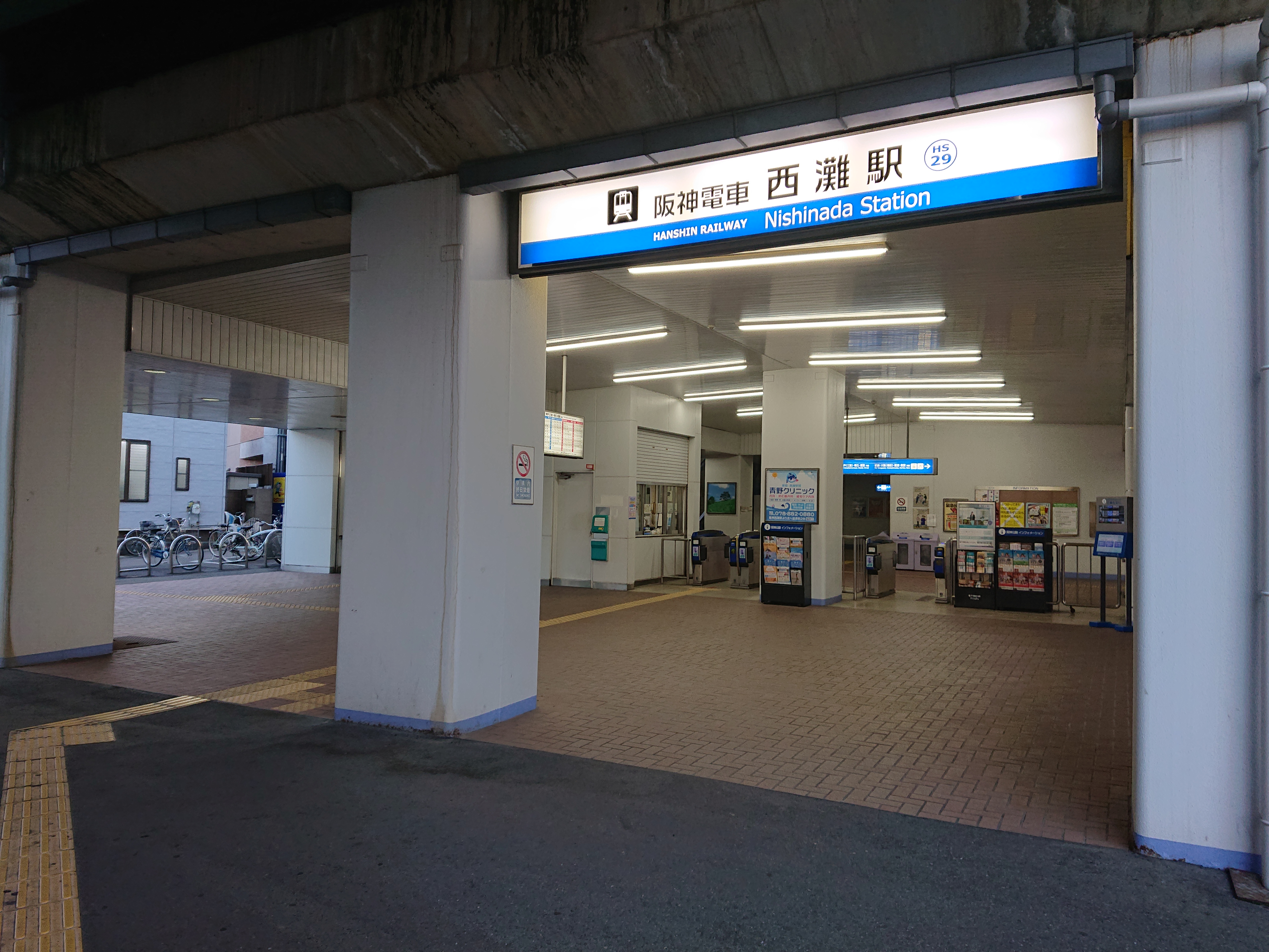 DSC_2169 (1)